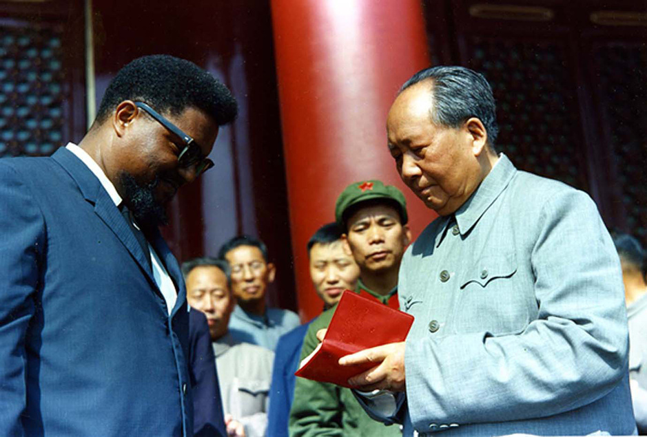 1966年10月1日，毛泽东在天安门城楼上给美国黑人领袖罗伯特·威廉签名。